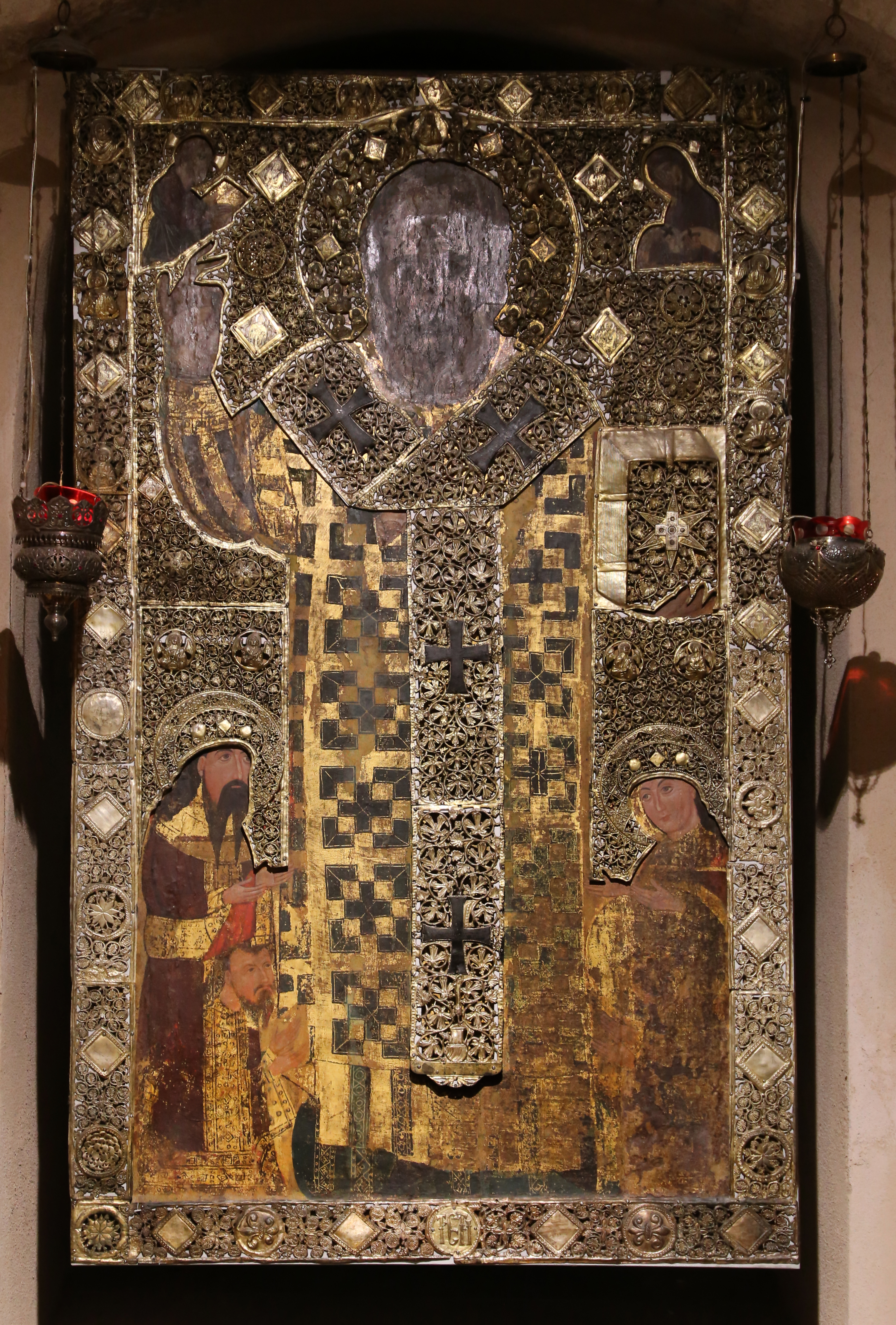 basilica di San Nicola This is a photo of a monument which is part of cultural heritage of Italy.